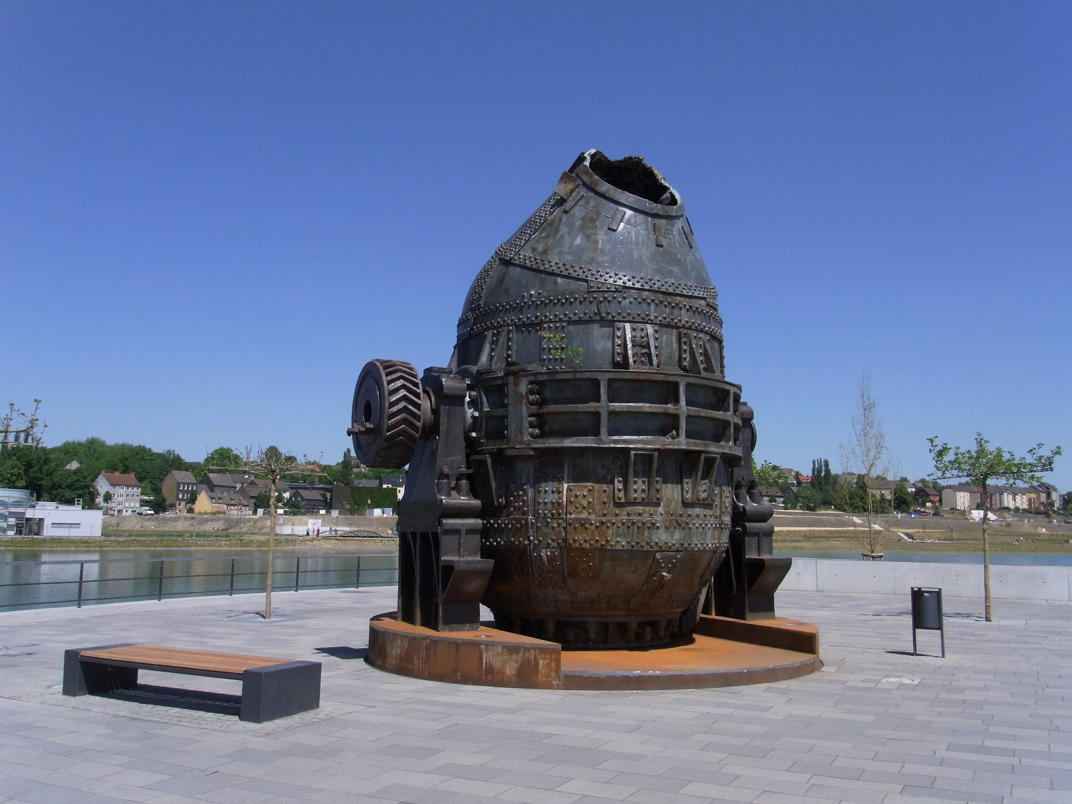 Thomasbirne am Phoenixsee